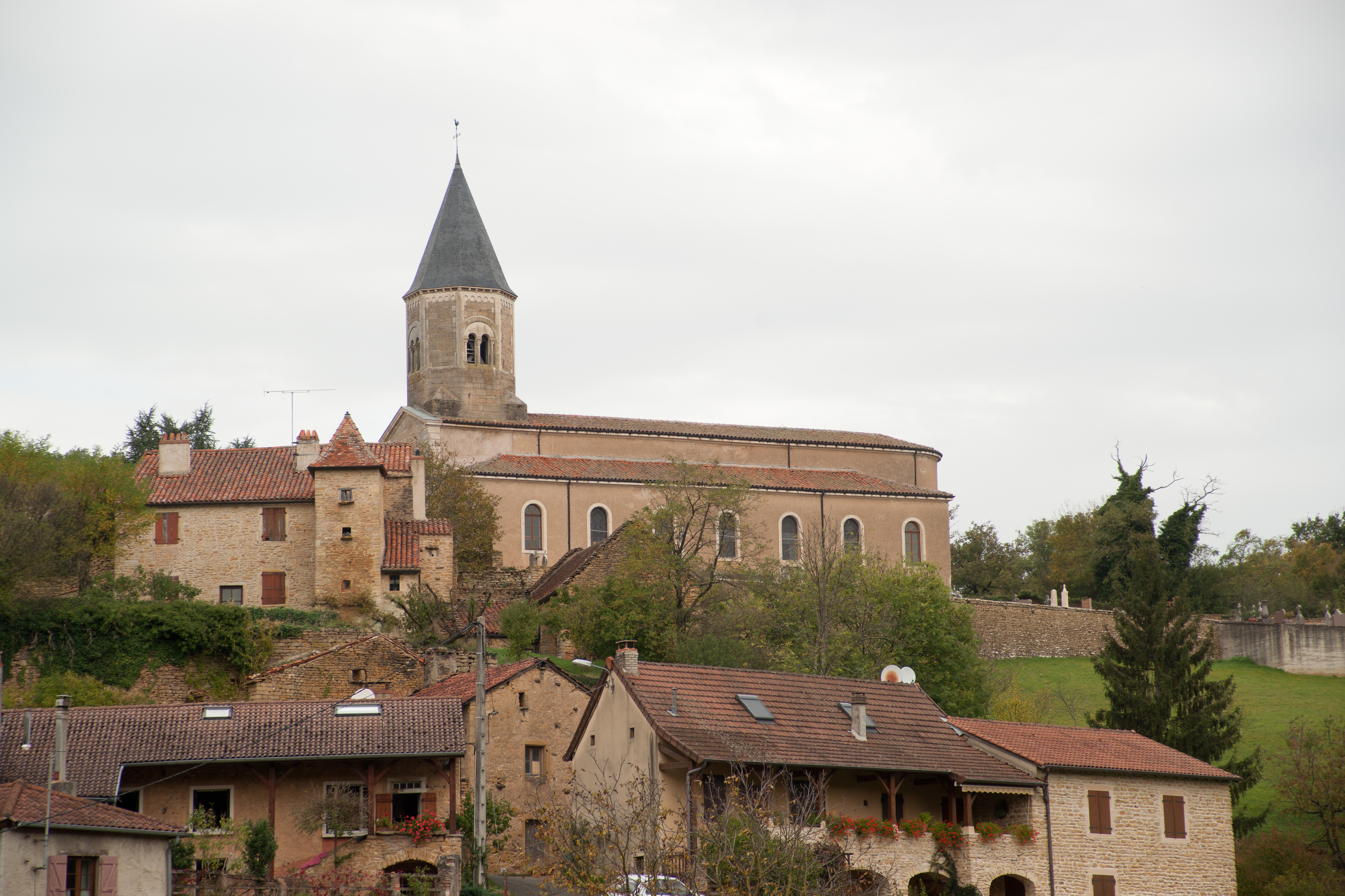 Lournand - église